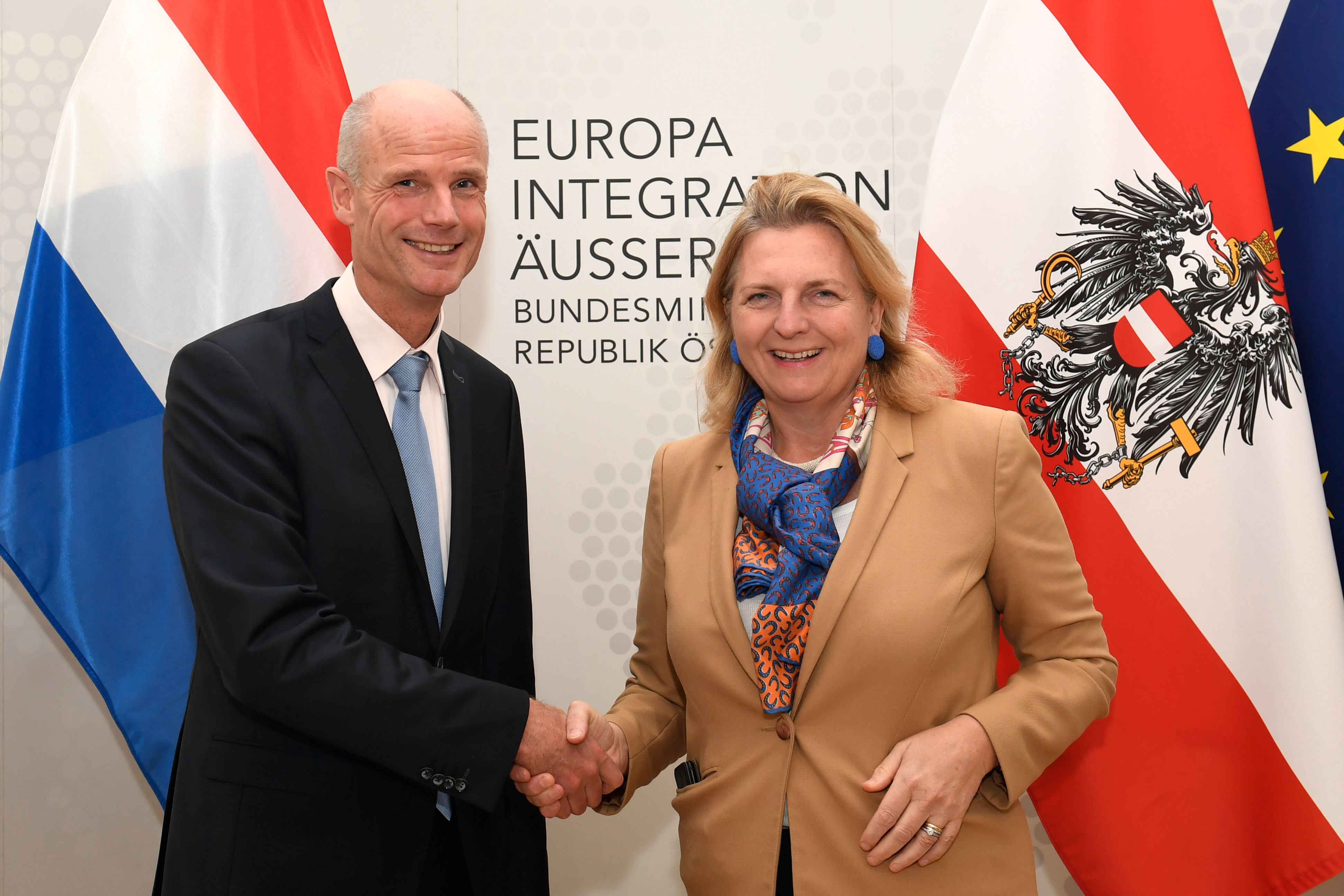 Außenministerin Karin Kneissl empfing am 12. Oktober 2018 ihren Amtskollegen aus den Niederlanden, Stef Blok, zu einem Arbeitsgespräch. Foto: Mahmoud